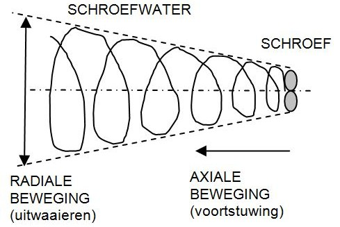 Het wieleffect verklaard